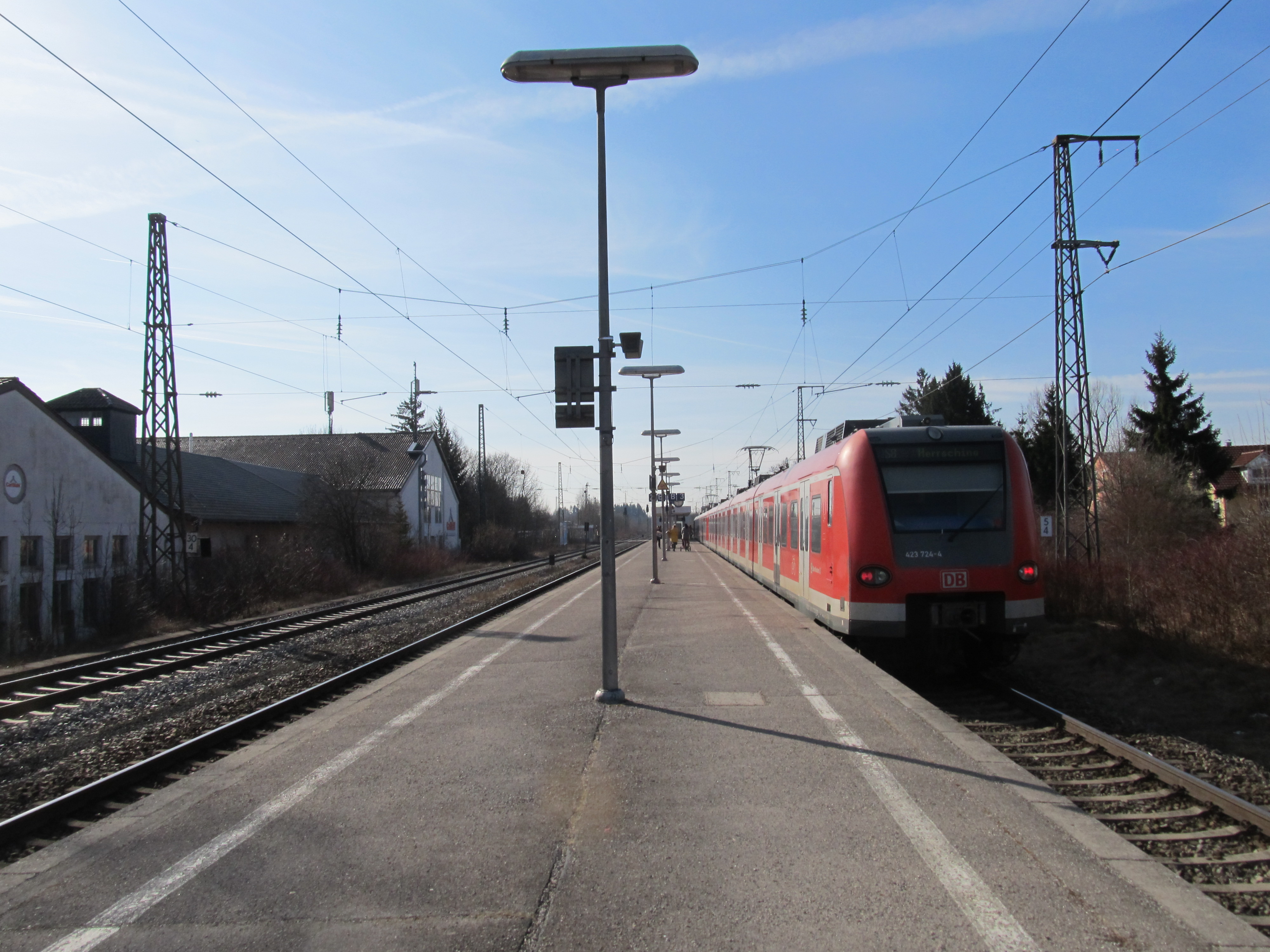 Bahnsteig des Bahnhofes München-Daglfing